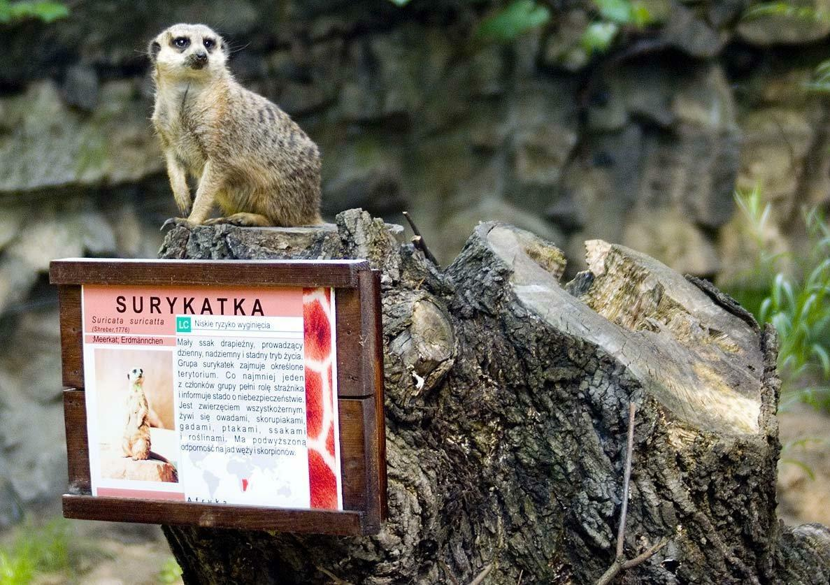 Autoprezentacja surykatki we wrocławskim ZOO, zachowującej się jak jest opisane na widocznej tablicy informacyjnej.